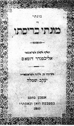 Le Comte de Monte-Cristo in Judeo-Arabic, 1889